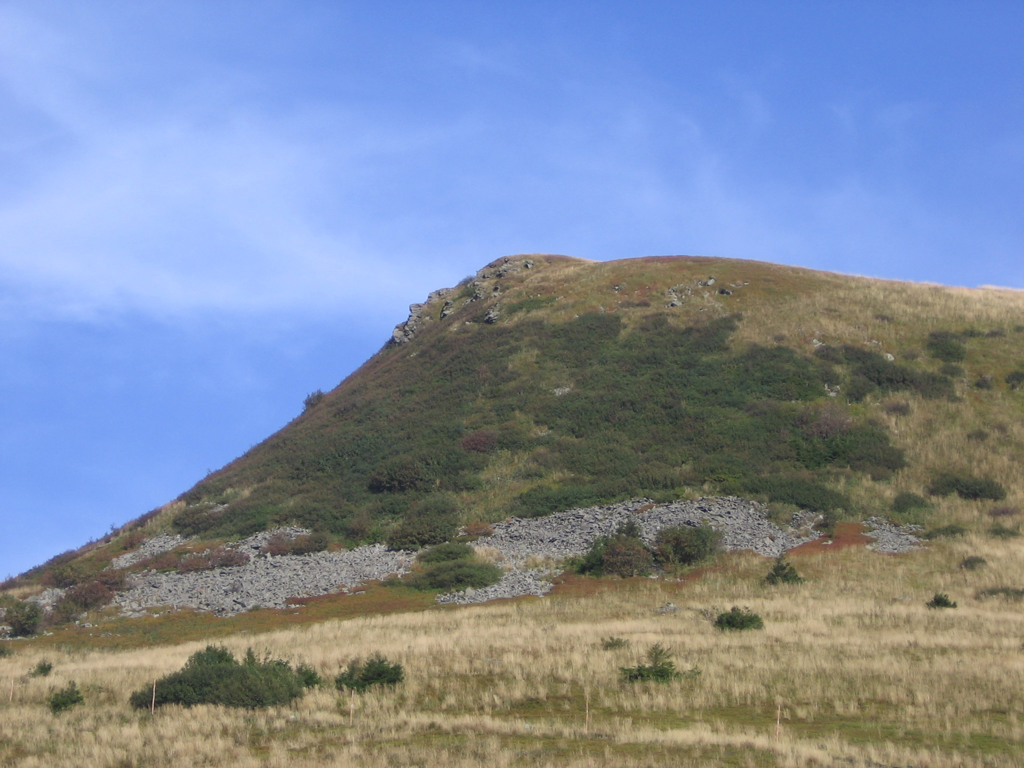 Tarnica peak in Bieszczady mountains - view from the end part of the path. Widok na zachodni kraniec pasma Tarnicy z końcowej części szlaku.